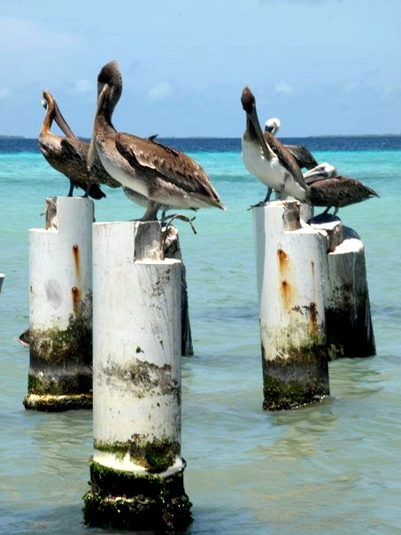 Alcatraz (Pelicanus occidentalis) de los Roques Venezuela